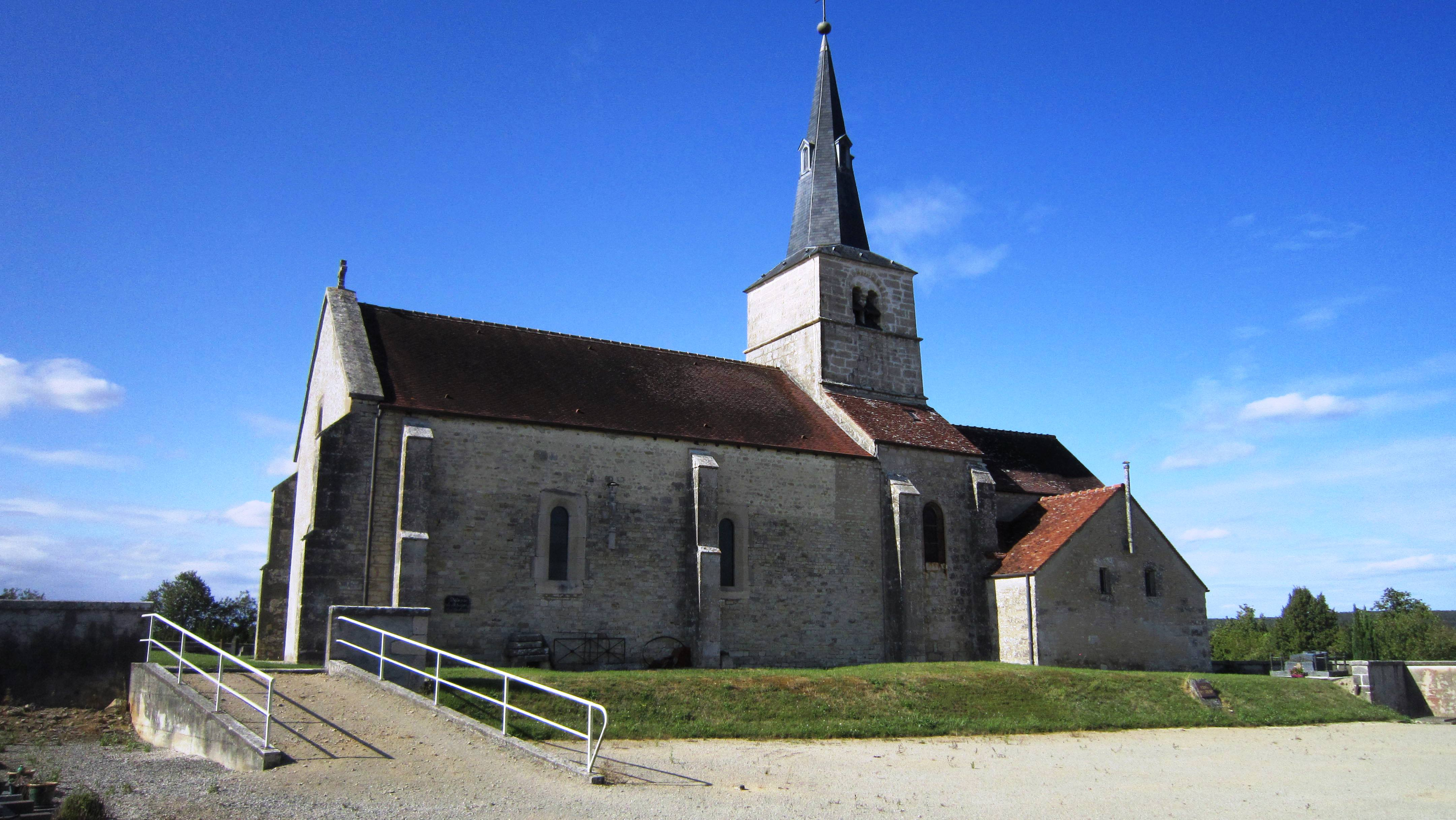 Eglise Saint-Valentin de Griselles (Côte-d'Or)